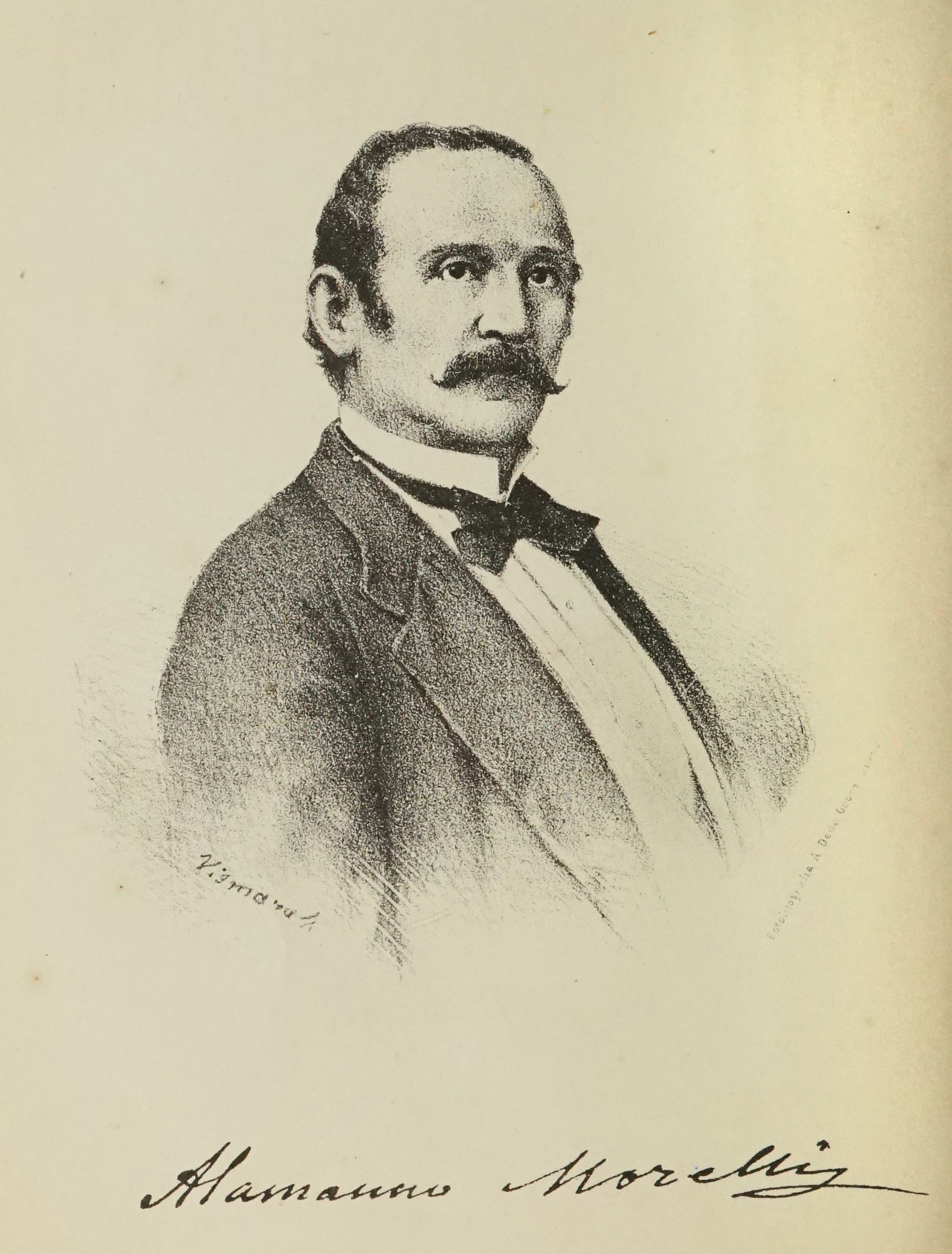 Ritratto a disegno di Alamanno Morelli (1812-1893), da Alamanno Morelli e l'arte sua (Mortara, 1879)